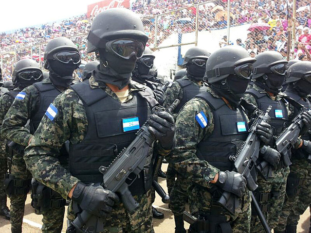 Policias Militares de Honduras armados con fusiles Galil ACE 21 durante los desfiles patrios